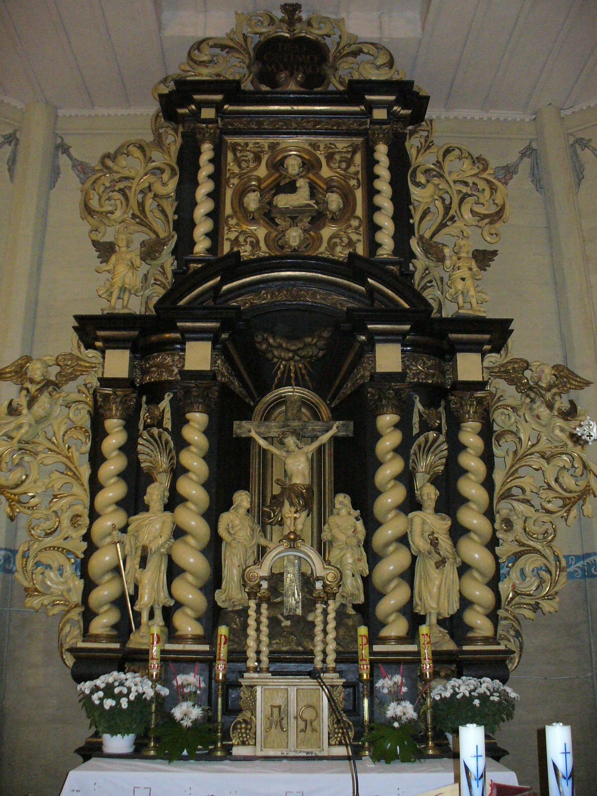 Ołtarz w Kościele pw. NNMP w Wieliczkach